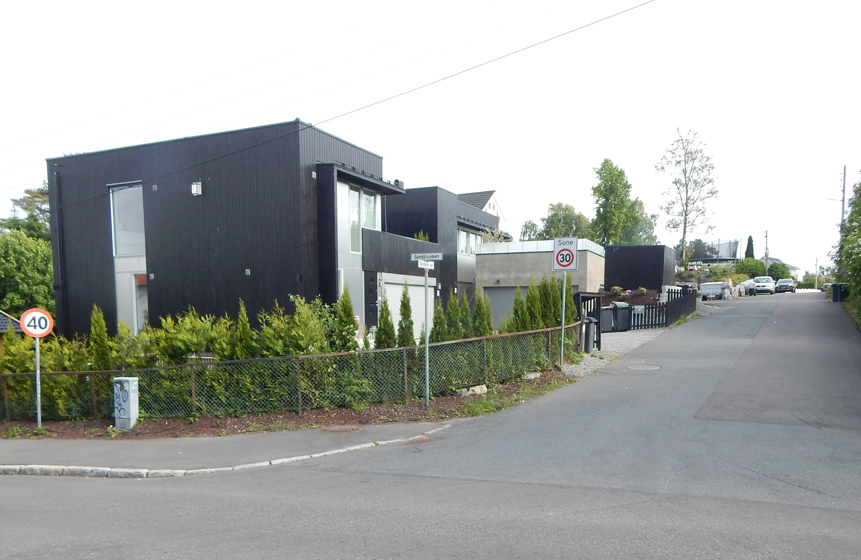 Tormods vei sett fra Sandstuveien